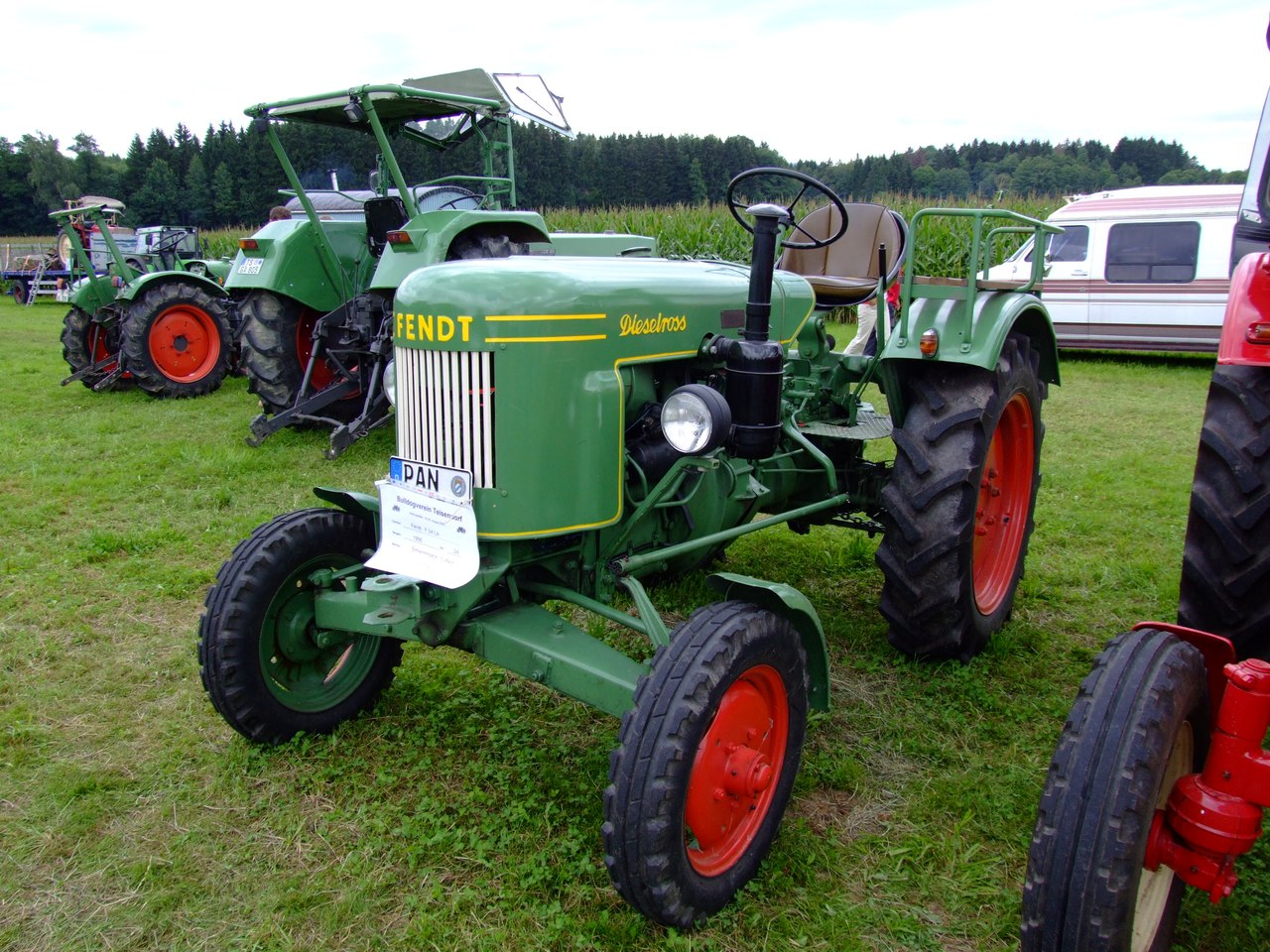 Fendt Dieselross F24LA mit 24 PS, Baujahr 1956